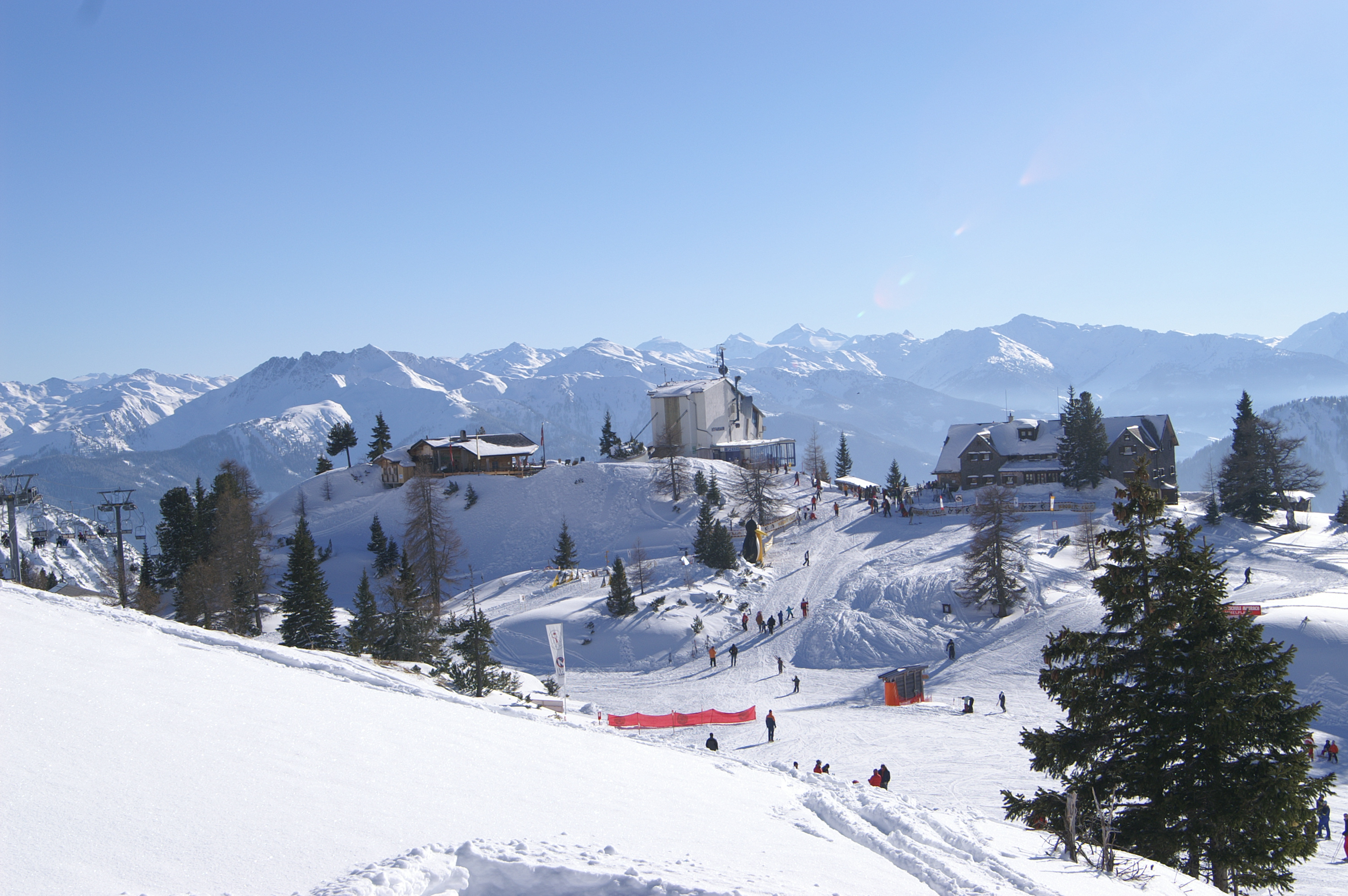 Skigebiet Rofan in Maurach am Achensee in Tirol; Links Berggasthof Rofan - Mitte Bergstation Rofanbahn - Rechts Erfurter Hütte.